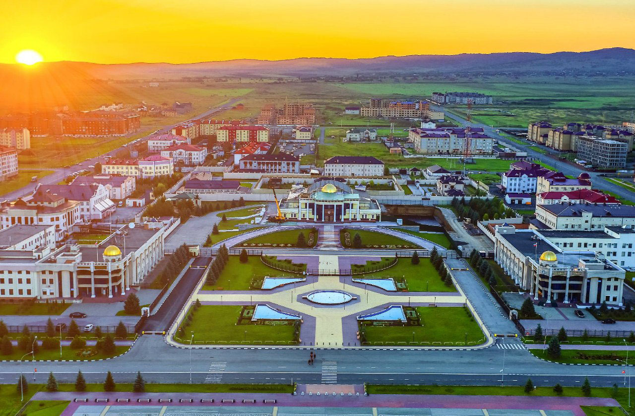 Город Магас с высоты Башни Согласия